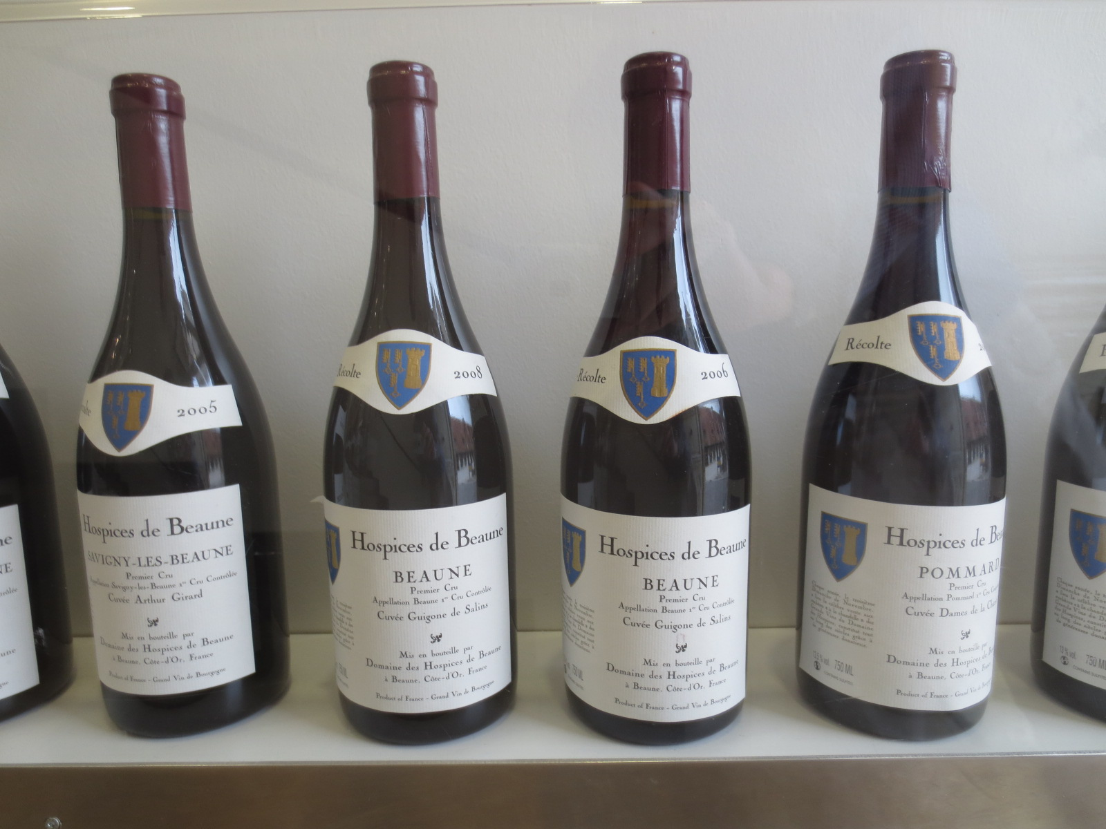 Vin Hôtel-Dieu de Beaune, dont bouteille de Beaune Ier cru - Cuvée Guigone de Salins